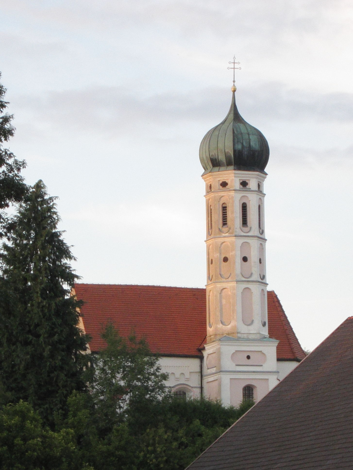 Amperpettenbach, Filialkirche St. Martin